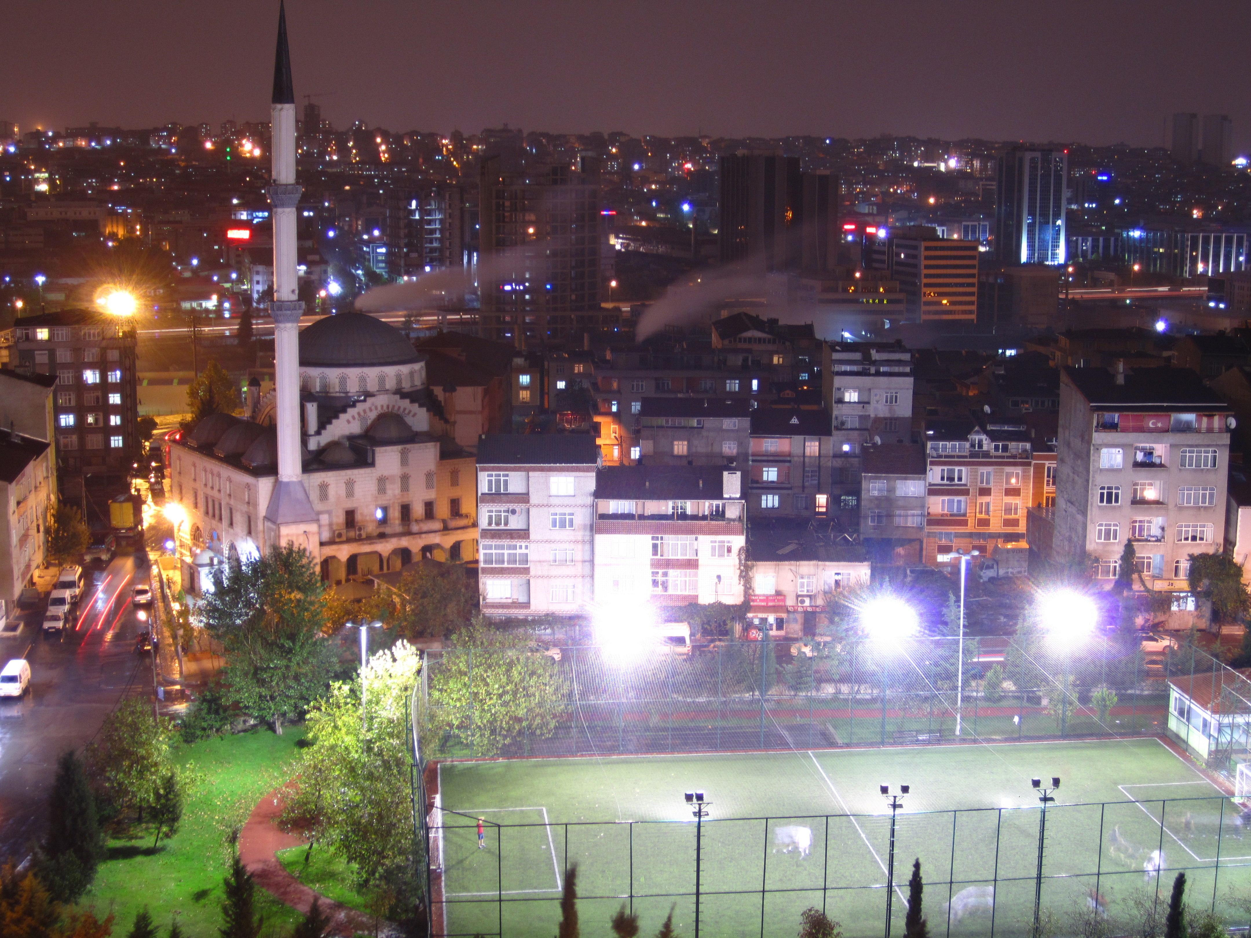 Bağlar Beyazıt Camii, Halkalı